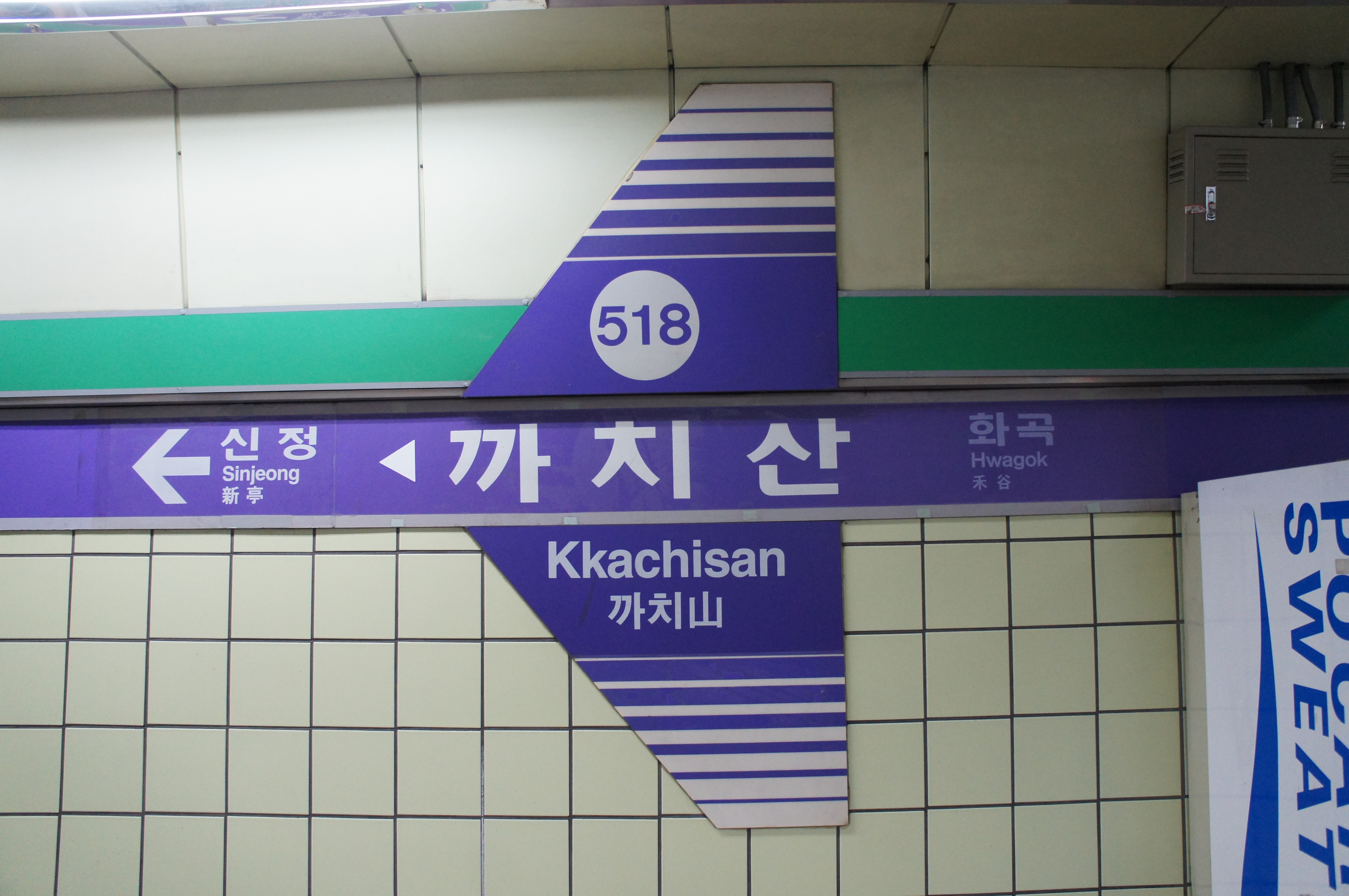 5호선 까치산역 역명판